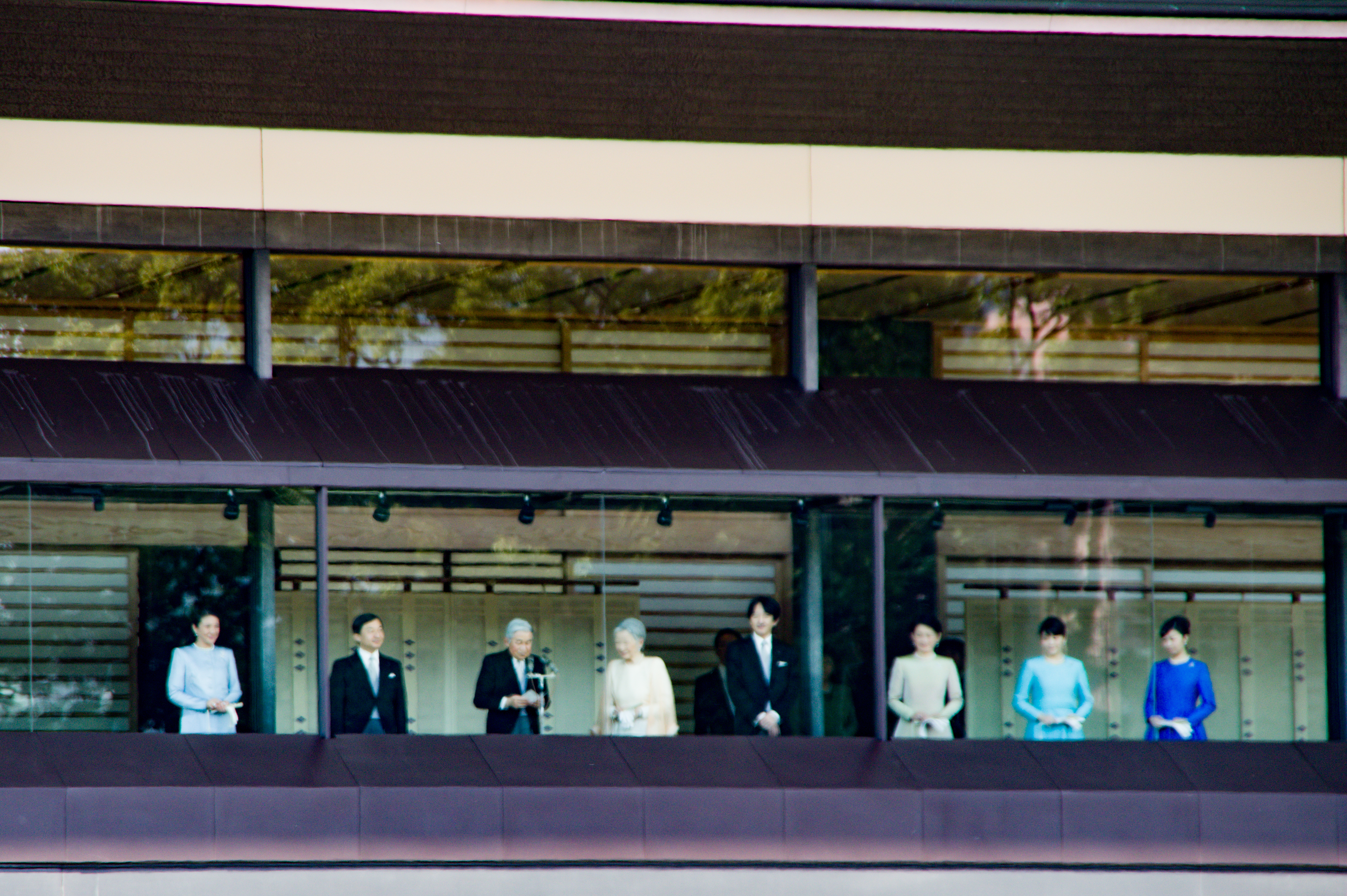 2016年新年一般参賀_16